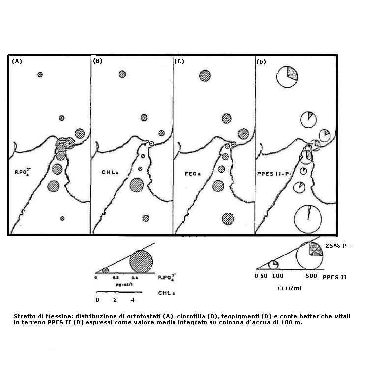 Stretto di Messina: distribuzione dei principali parametri chimici e biologici come valore medio integrato (media ponderata) sulla colonna d'acqua di 100 m. Messina Straits: distribution of main chemical and biological parameters as weighted average along 100 m water column.